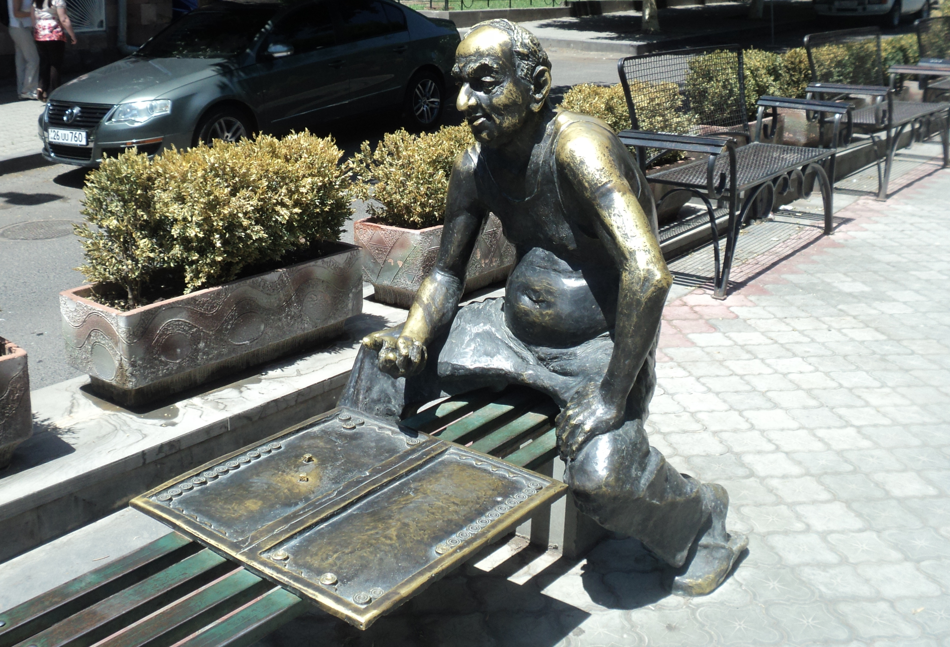 Քանդակագործ` Էդուարդ Շախիկյան